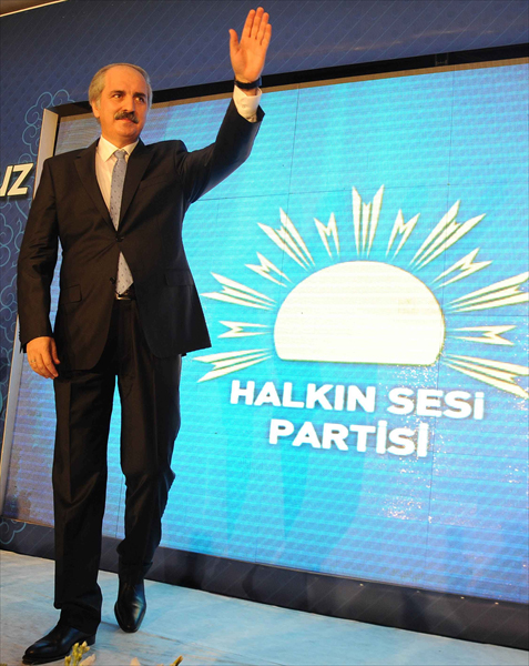 Numan Kurtulmus Ankara Rixos Hotel Kurulus Toplantisi